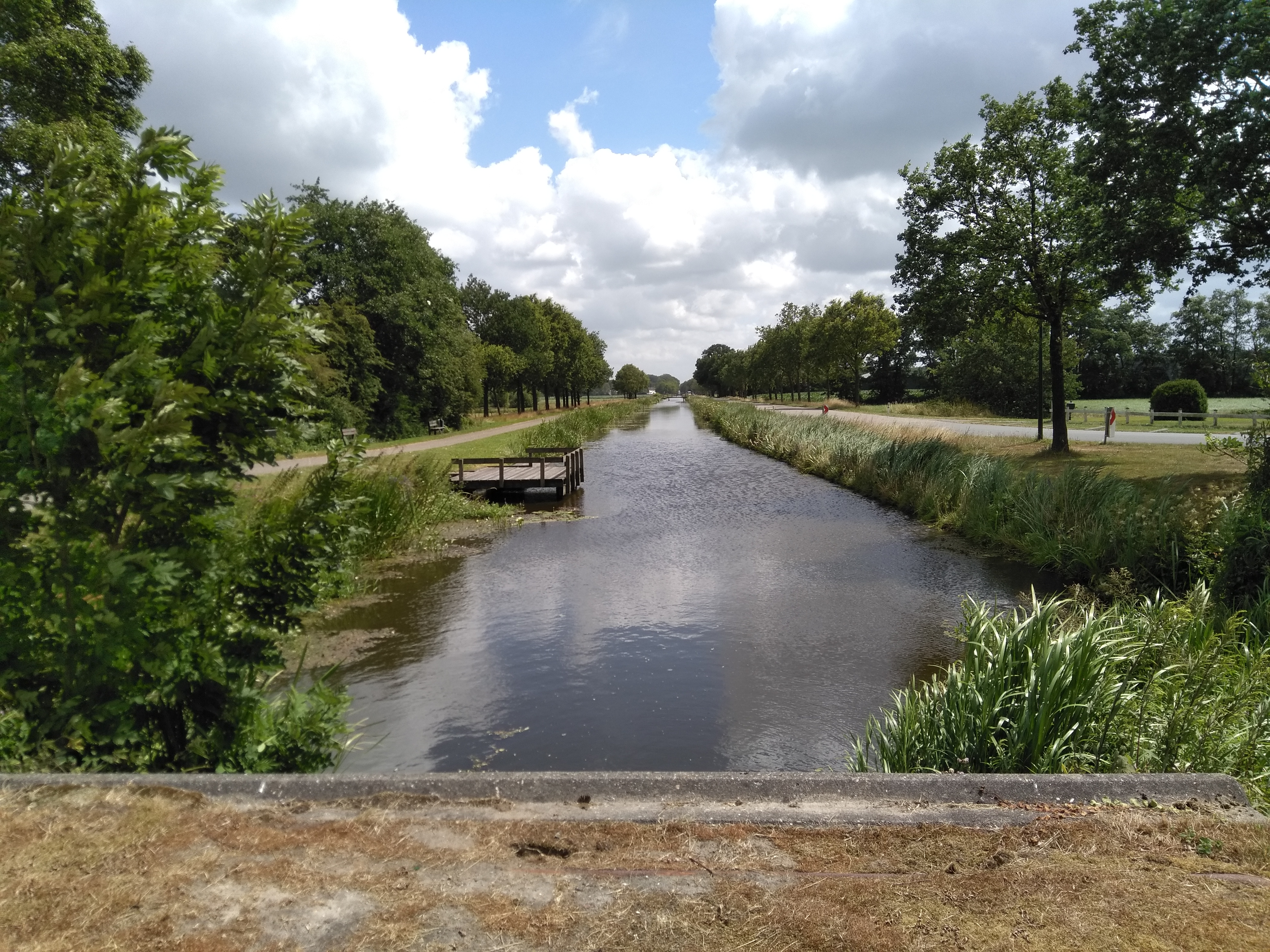 Bakkeveenster Vaart in de richting van Bakkeveen bij Siegerswoude, gemeente Opsterland, Friesland.